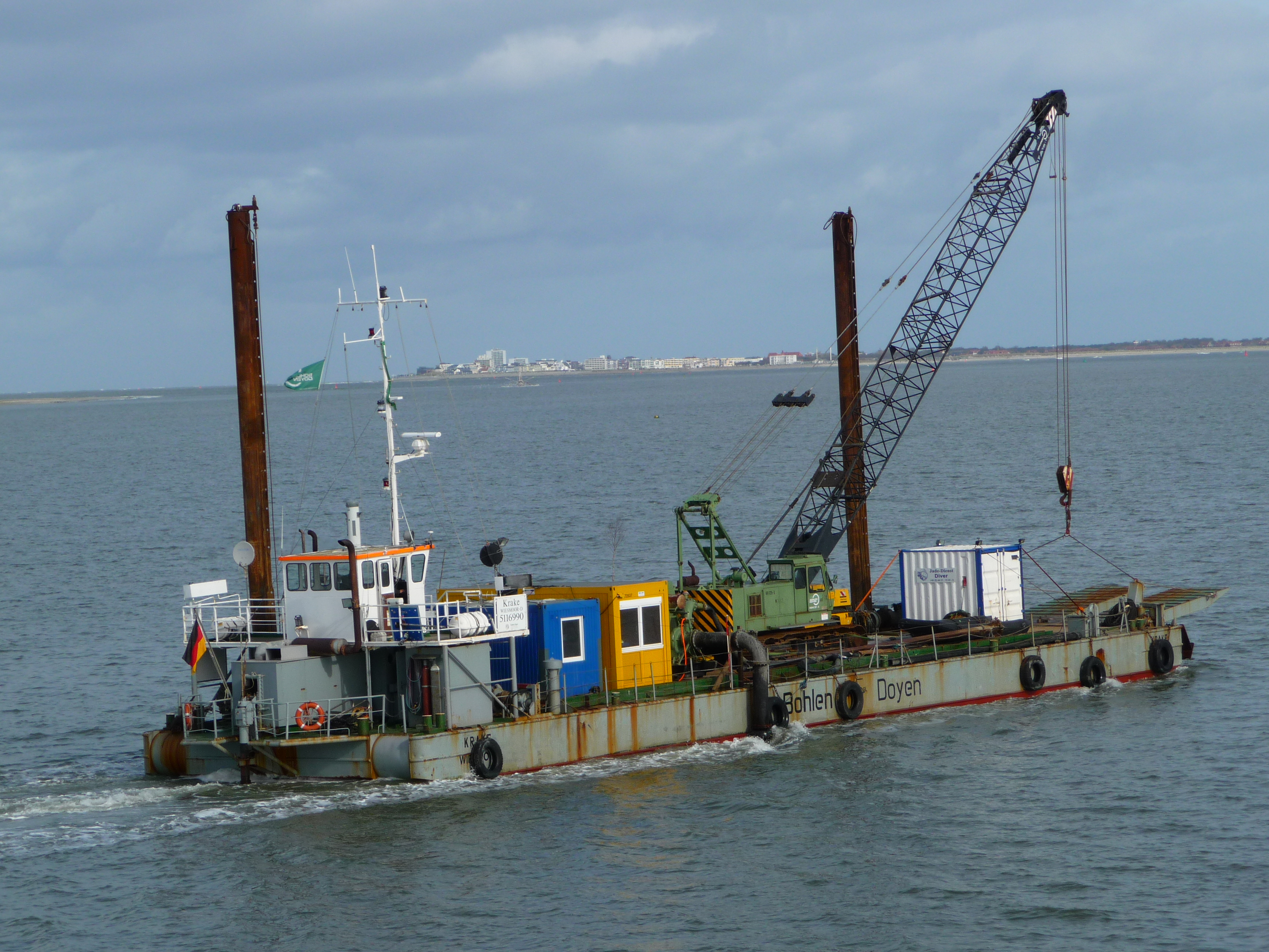 Saugbagger KRAKE der Firma Bohlen und Doyen mit eigenem Antrieb in der Nordsee, im Hintergrund die ostfriesische Nordseeinsel Norderney (Niedersachsen, Deutschland)